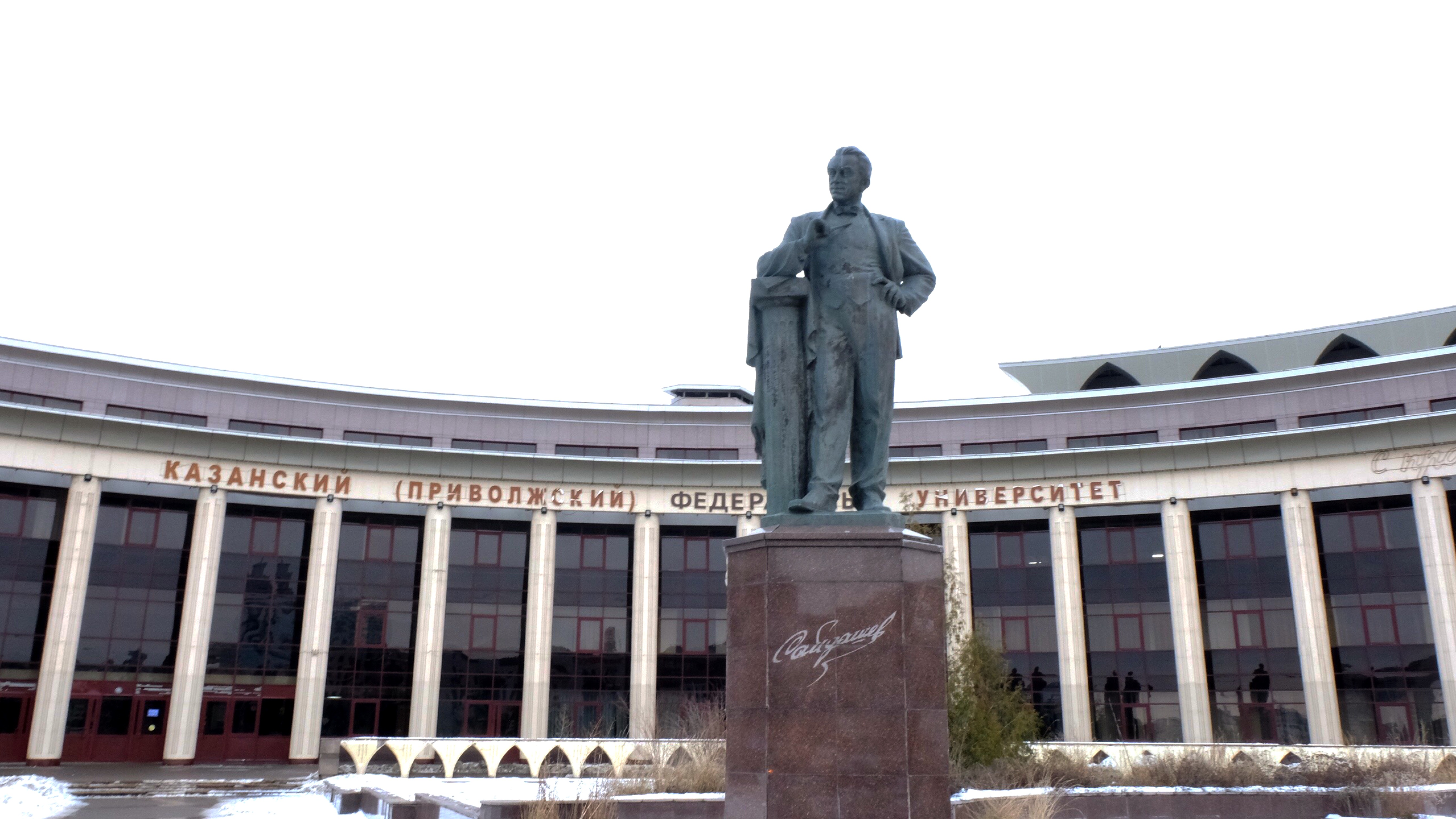 Памятник Салиху Сайдашеву находиться перед Казанским (Приволжским) Федеральным Университетом.